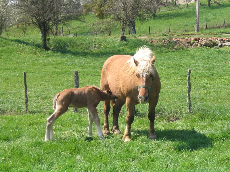 Cheval comtois